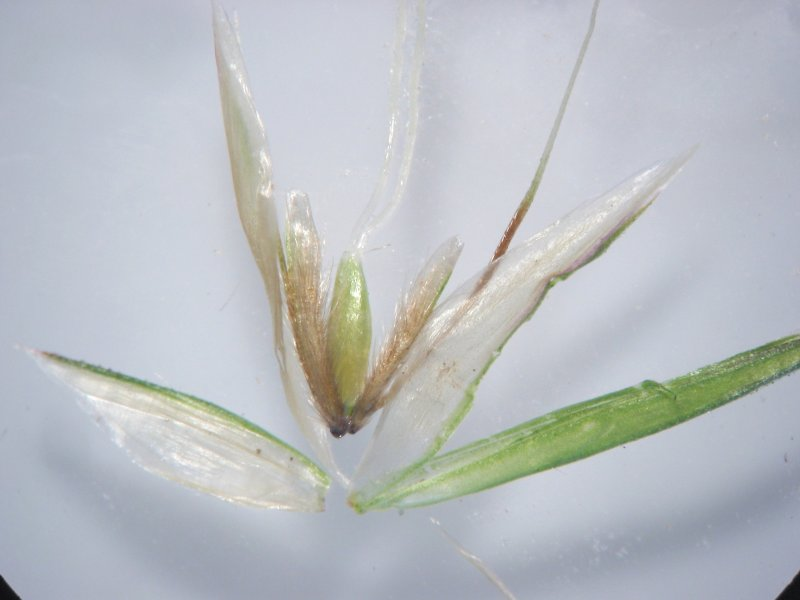 Ährchen des Gewöhnlichen Ruchgrases Anthoxanthum odoratum